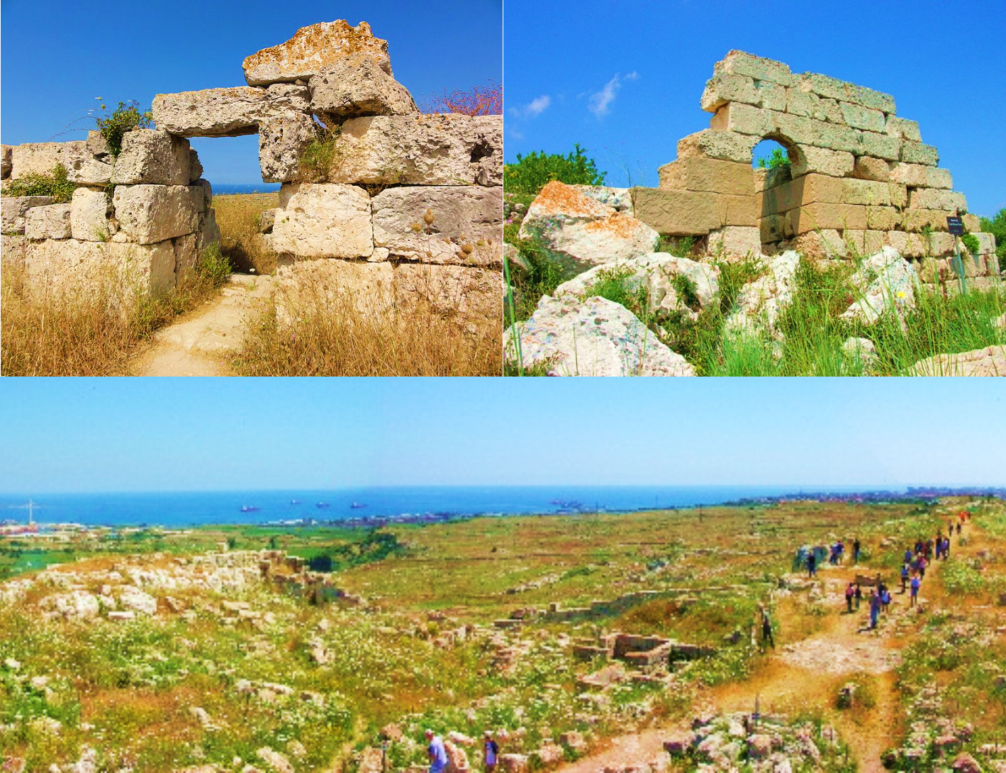 Collage di foto sul castello Maniace; tre già presenti su Commons, quarta opera propria caricata con licenza cc-by-sa-4.0.